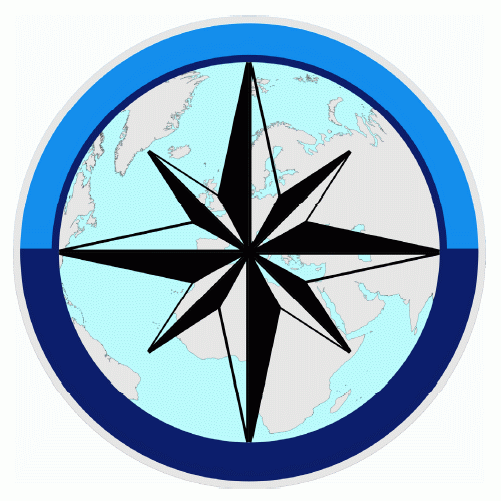 Szefostwo Służby Hydrometeorologicznej Sił Zbrojnych RP – oznaka rozpoznawcza na mundur wyjściowy – 2012, Polska.